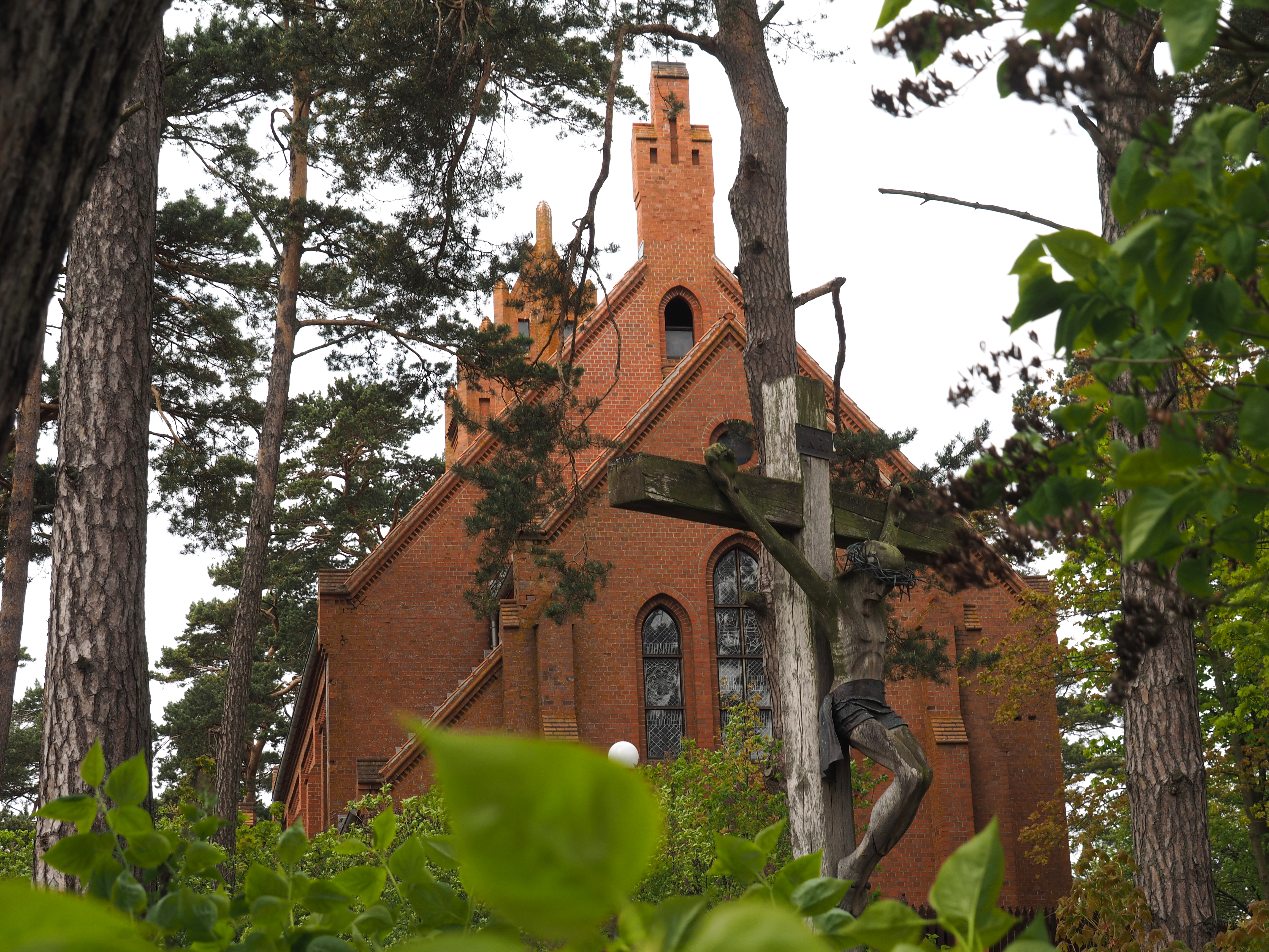 Evangelische Kirche in Nidden (Kurische Nehrung)